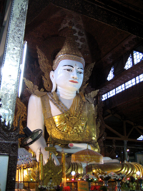 Nga Htat Gyi Buddha Image, Yangon, Yangon Region